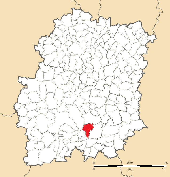 Carte de position de Puiselet-le-Marais en Essonne (91)